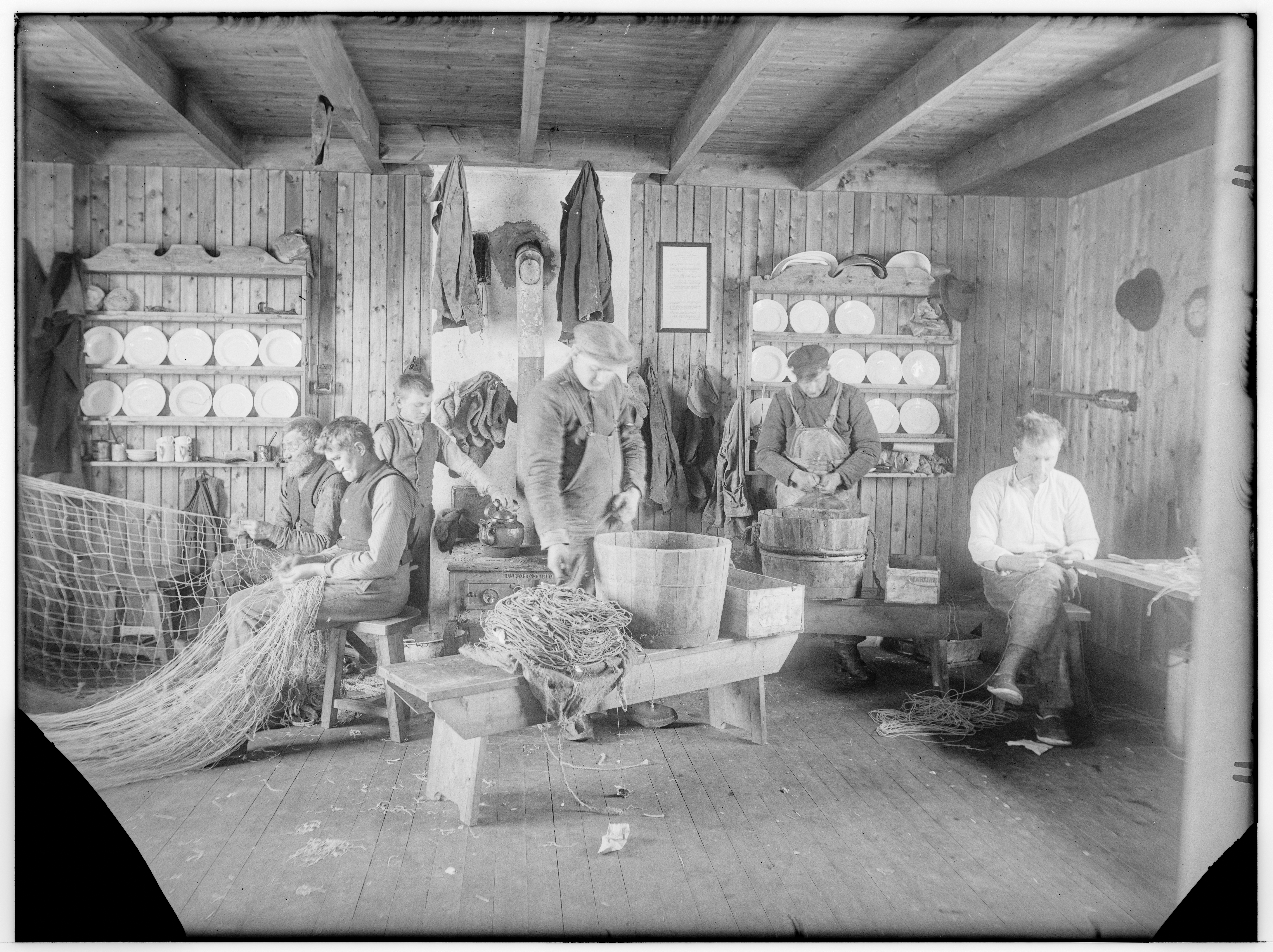 Bildet er hentet fra Arkivverket. Rorbuinteriør, Henningsvær, Nordlands amt Arkivinstitusjon : Riksarkivet Arkivnavn : Havnedirektoratet Sted : Norge, Nordland, Vågan, Emneord: Interiør, Arbeid Avbildet